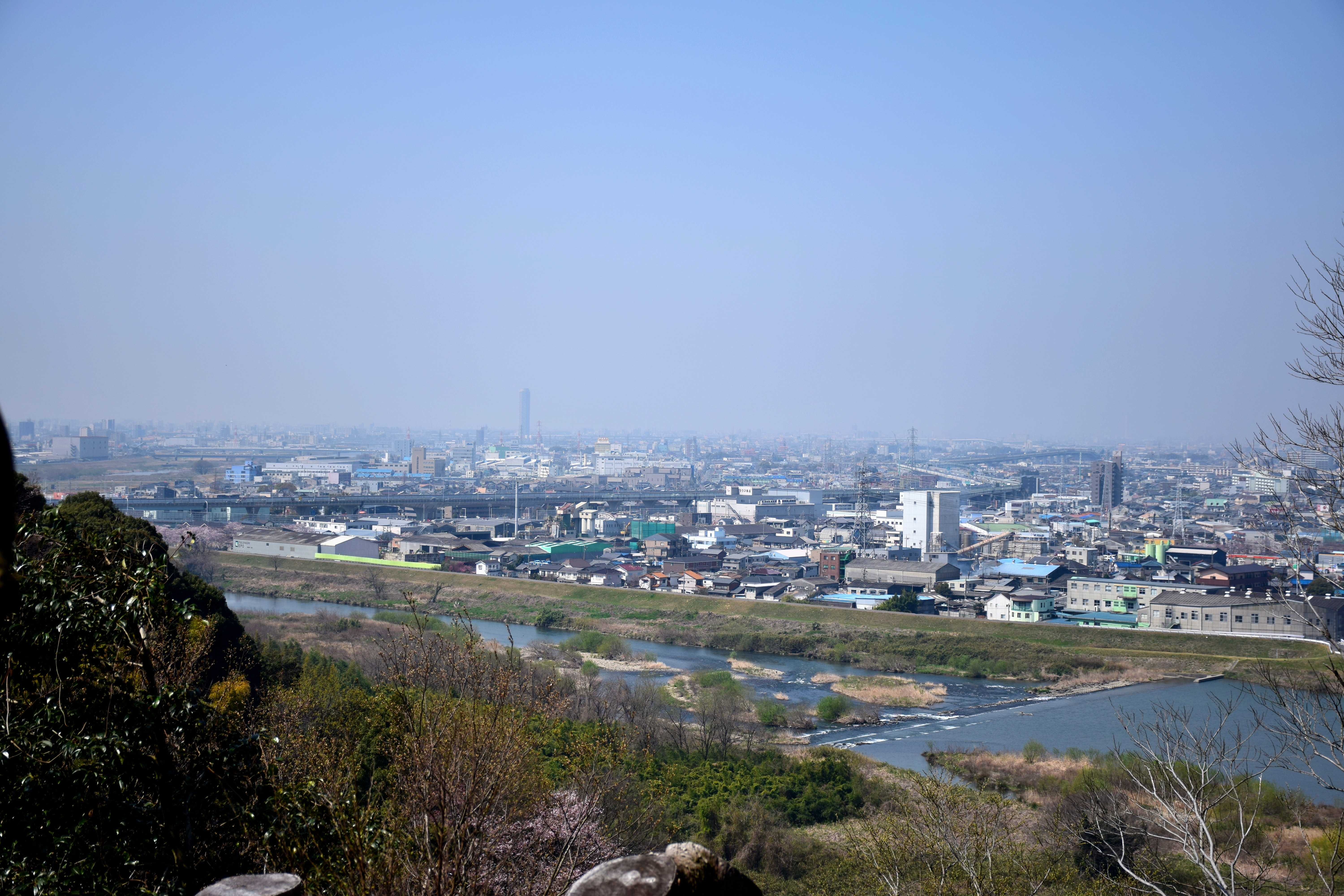 庄内川と春日井市街